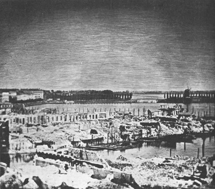 Die Zerstörungen des Hamburger Brandes 1842 im Bereich der Kleinen Alster. Blick vom Dach der Börse in Richtung Lombardsbrücke. Daguerreotypie von Hermann Biow. Dieses Bild ist nicht nur die älteste erhaltene Fotografie von Hamburg, sondern gilt auch als älteste erhaltene "Reportagefotografie" überhaupt. (Hinweis: Das Bild wurde nicht, wie noch bei Kleßmann angegeben, von Carl Ferdinand Stelzner aufgenommen, sondern von Hermann Biow, wie Heiligabend 2002 dem Hamburger Abendblatt zu entnehmen war. Aber auch wenn Stelzner der Fotograf wäre, bliebe das Bild gemeinfrei.)